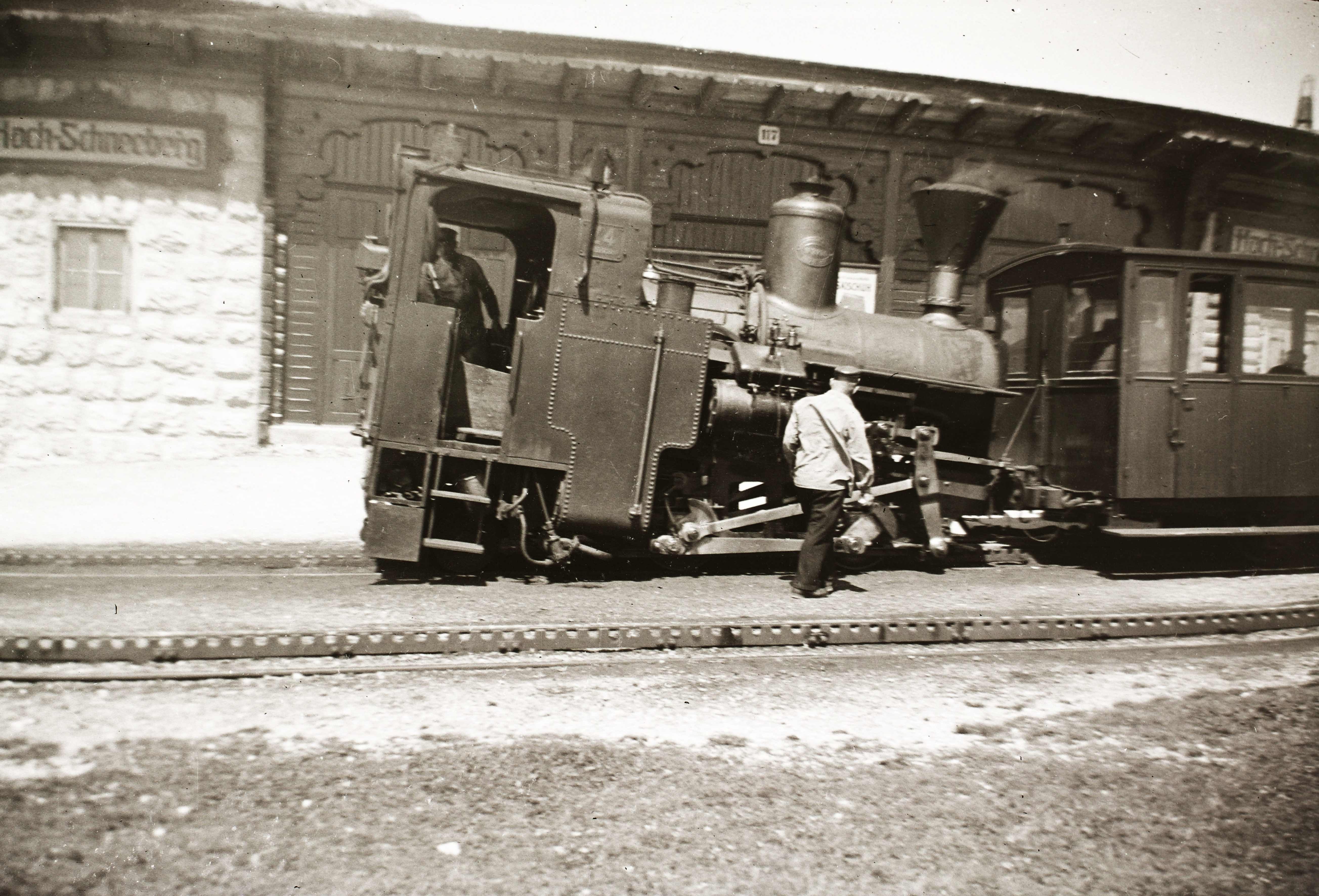 Hochschneeberg, a Puchberg-ből induló fogaskerekű vasút, a Schneebergbahn felső végállomása.